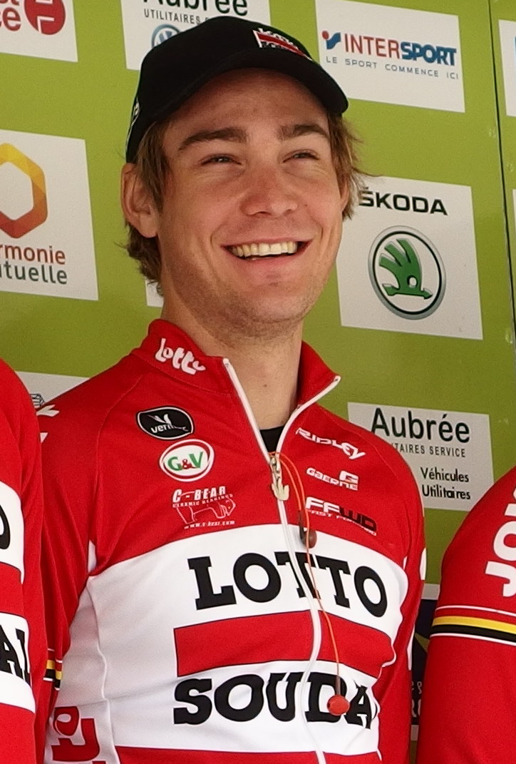 Tour de Bretagne 2015 - Présentation des équipes au départ de la troisième étape à Baud - Équipe Lotto-Soudal U23 Depicted person: Hayden McCormick